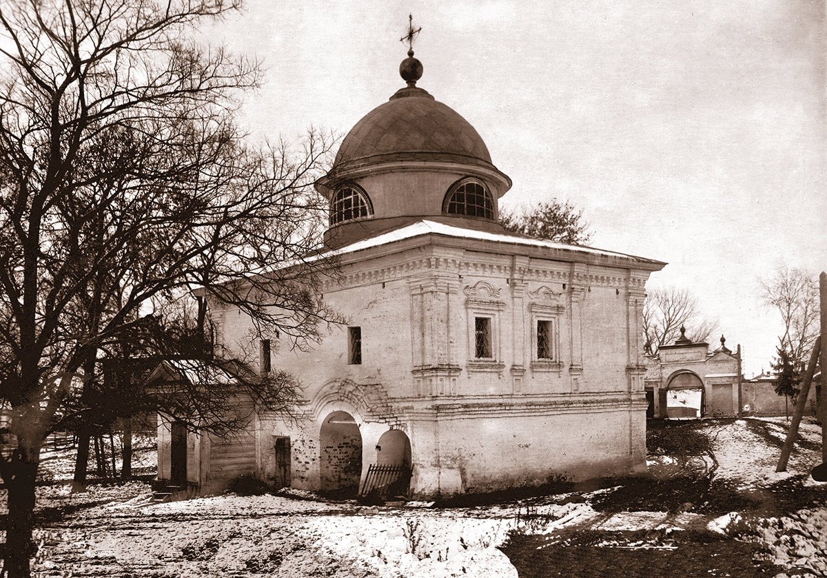 Надвратная церковь во имя Алексия, человека Божия, и въездные ворота ограды Горне-Успенского монастыря